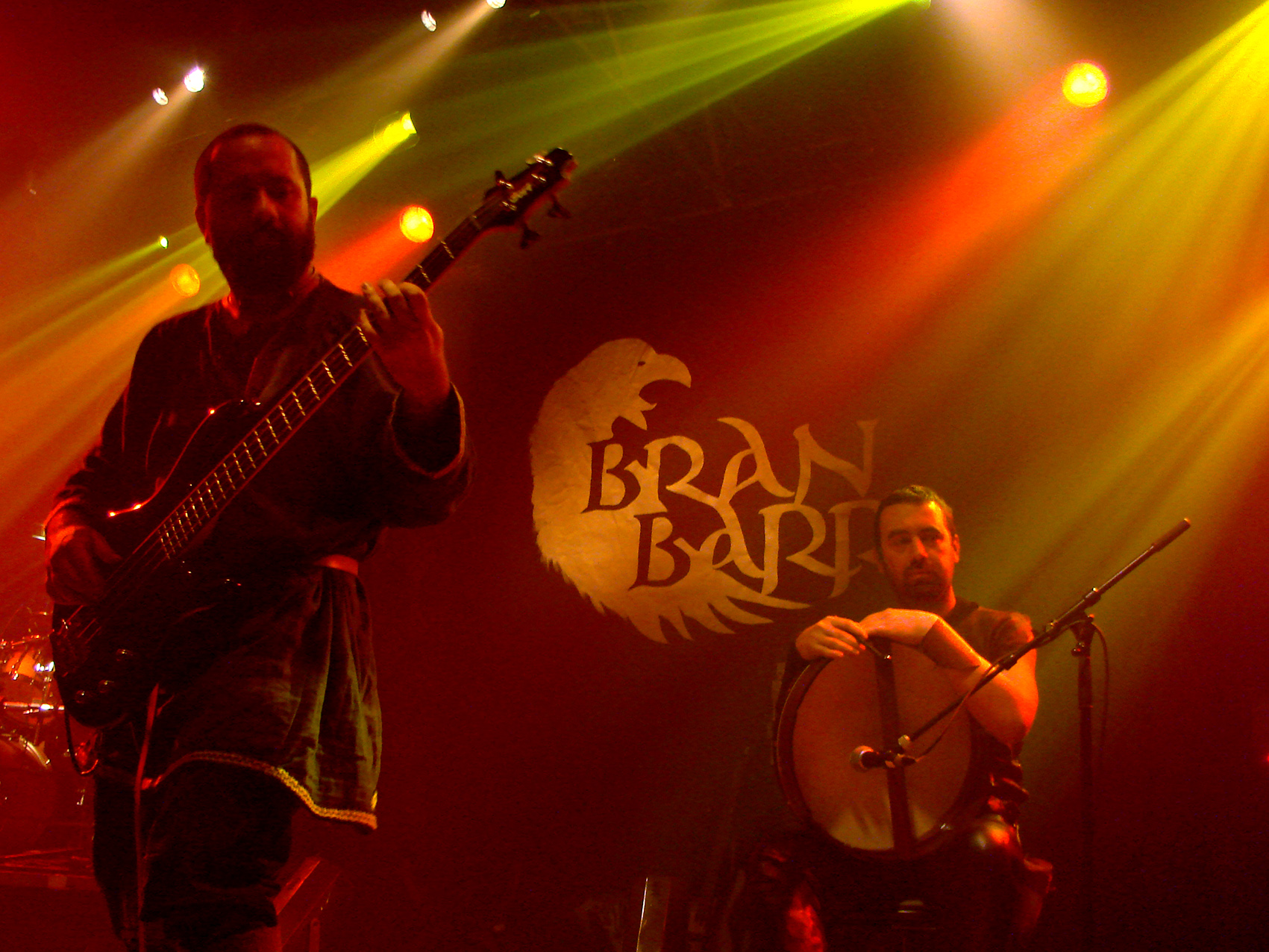 Bran Barr au Cernunnos Fest 07, le 16/12/07 à la Locomotive, Paris.